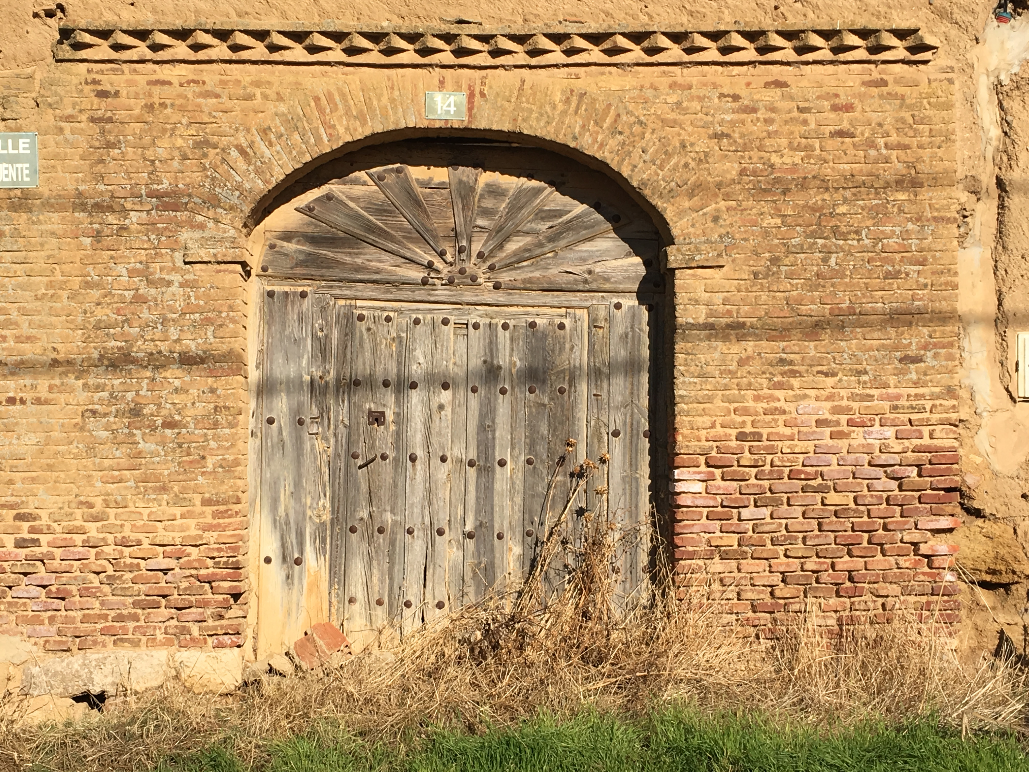 Villaesper Milenario